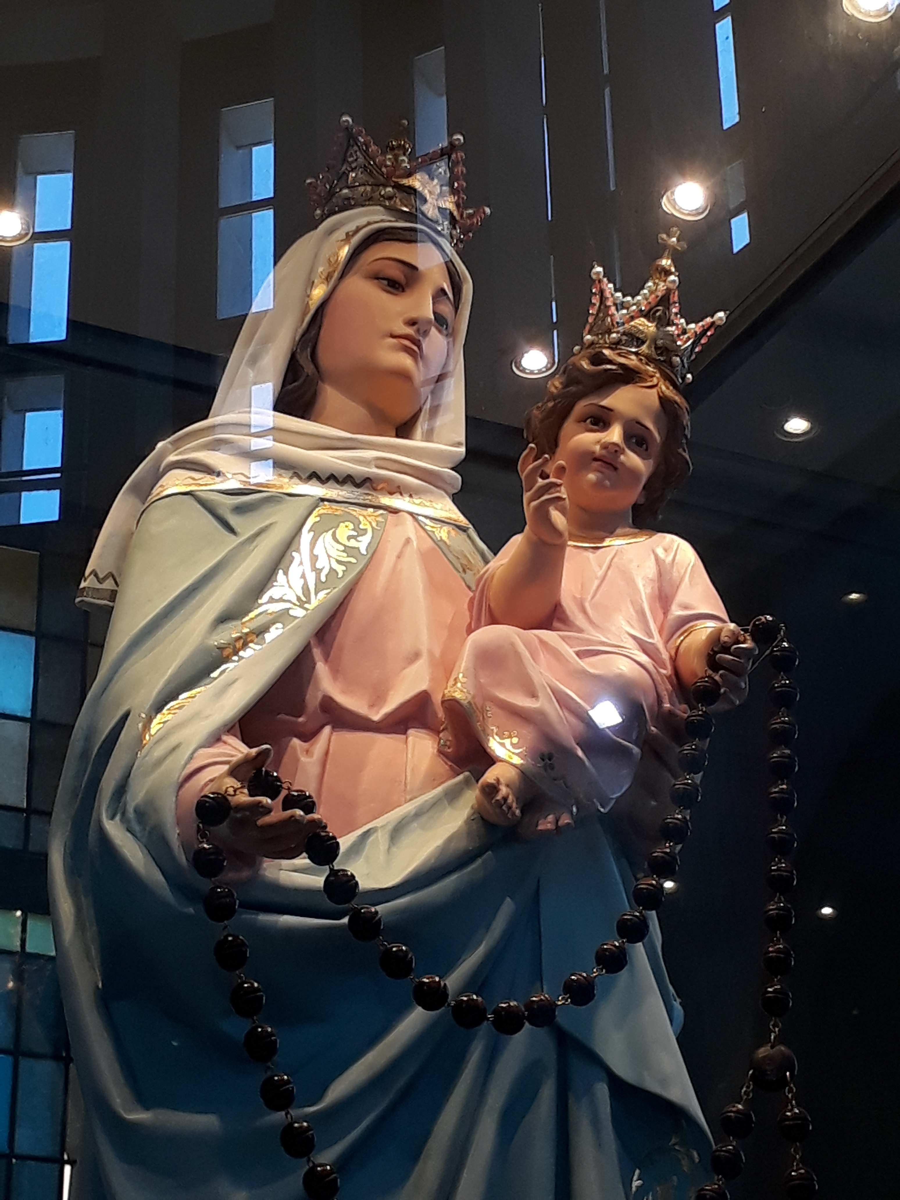 Santuario de la Virgen del Rosario de San Nicolás.